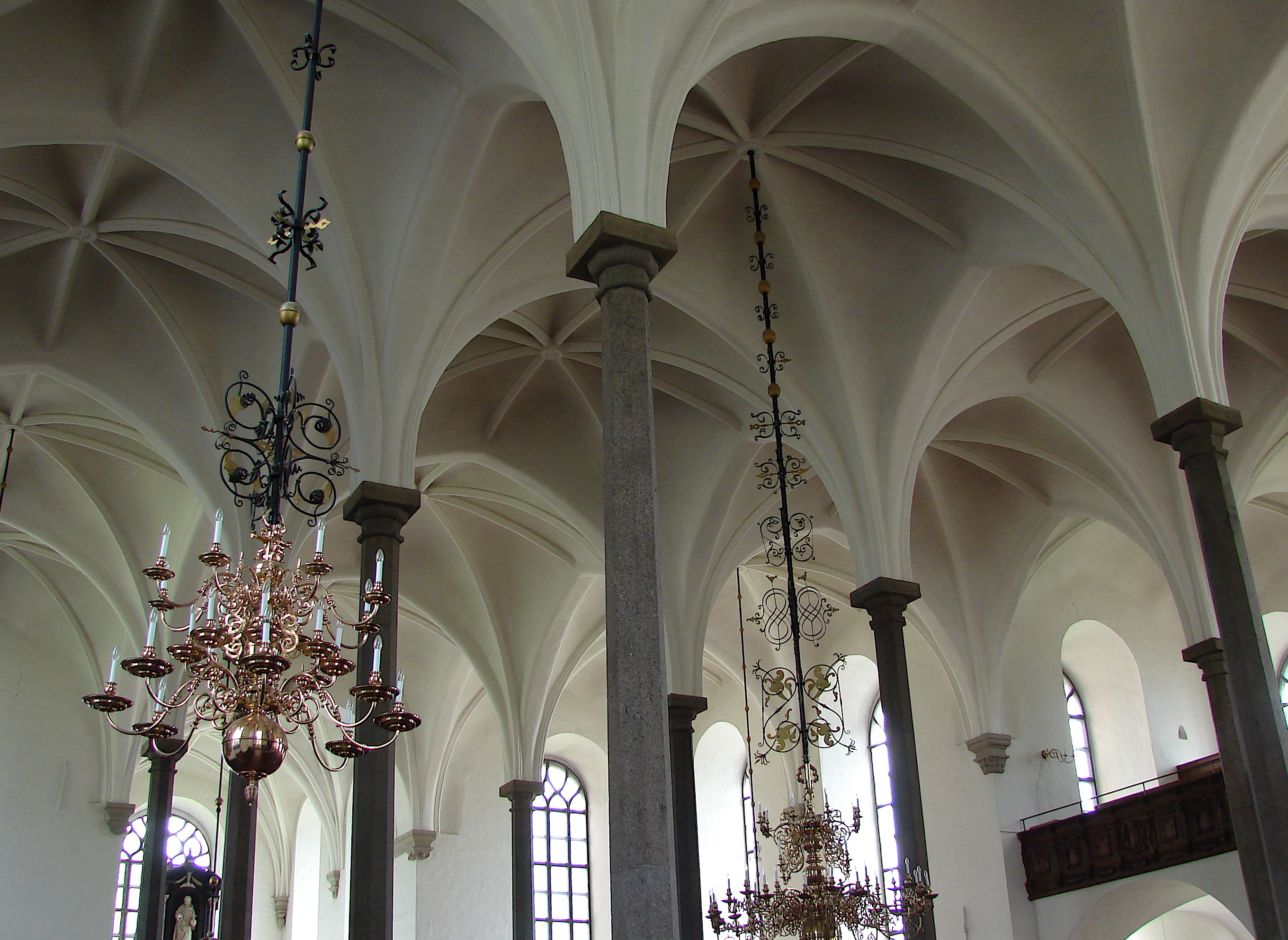 Hvelvinger Trefoldighedskirken Christianstad, Skåne